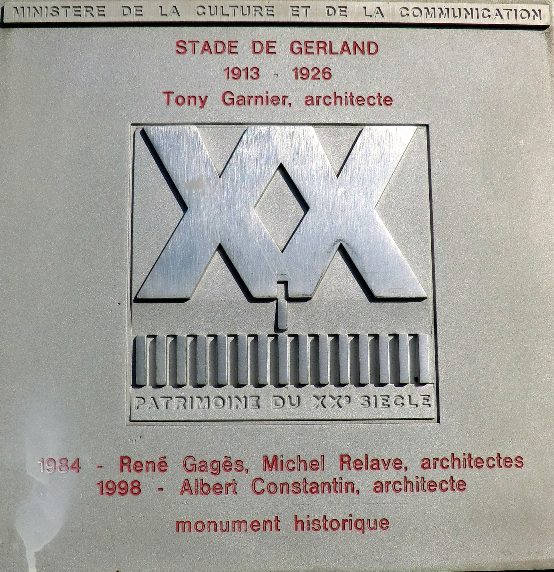 Panneau Patrimoine du XXe siècle à Gerland.